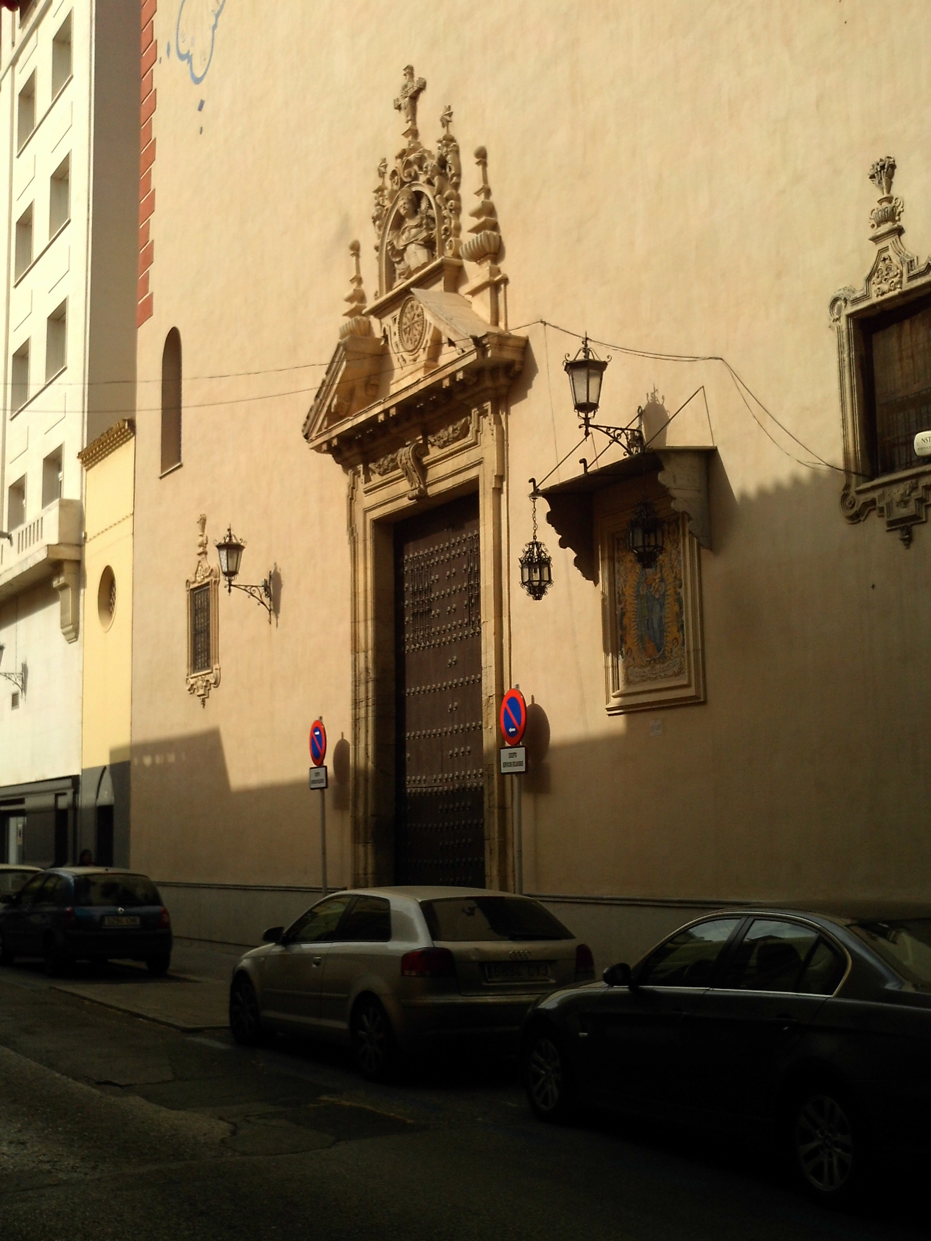 Azulejo de la Virgen de Amparo en fachada de la iglesia de Santa María Magdalena. Sevilla, Andalucía, España.